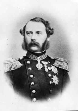 Портрет датского короля Христиана IХ в военной форме. (Поясной портрет)